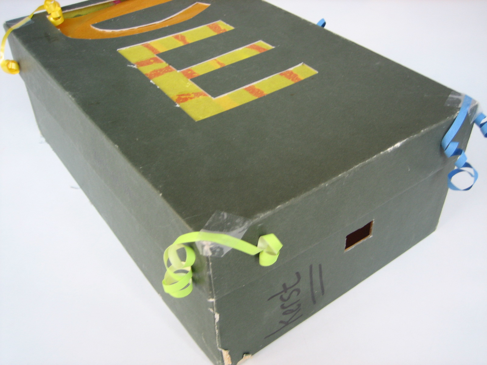 Kijkdoos (buitenaanzicht)